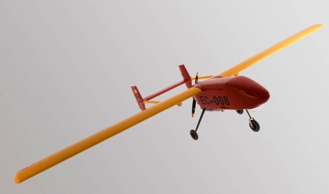 RPA DE FLIGHTECH